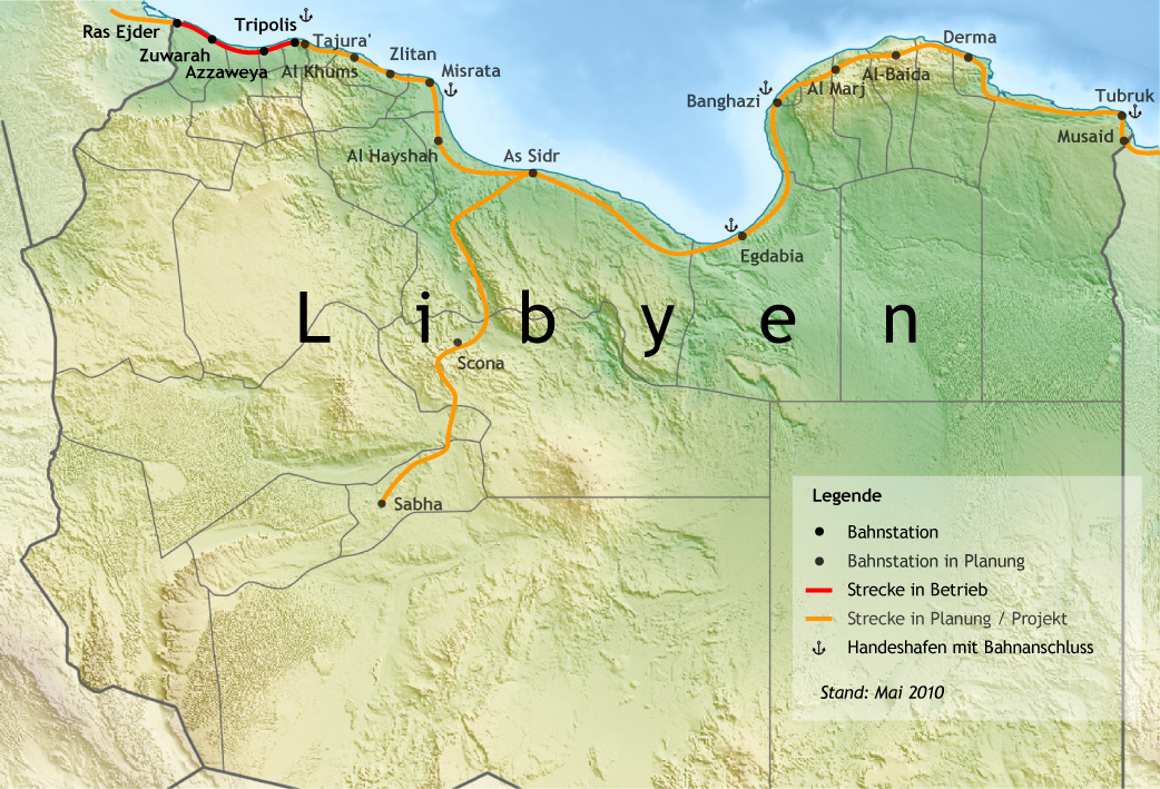 Eisenbahnlinien in Libyen